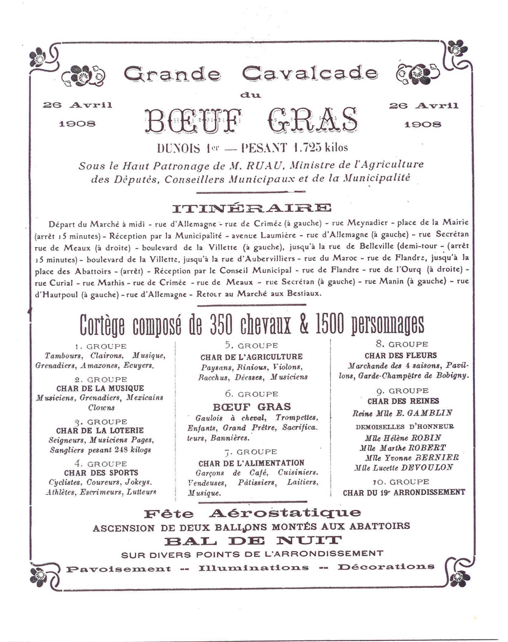 Programme du Bœuf Gras - 26 avril 1908, feuille volante. Ce cortège carnavalesque sort ici en dehors de la période traditionnelle du Carnaval.